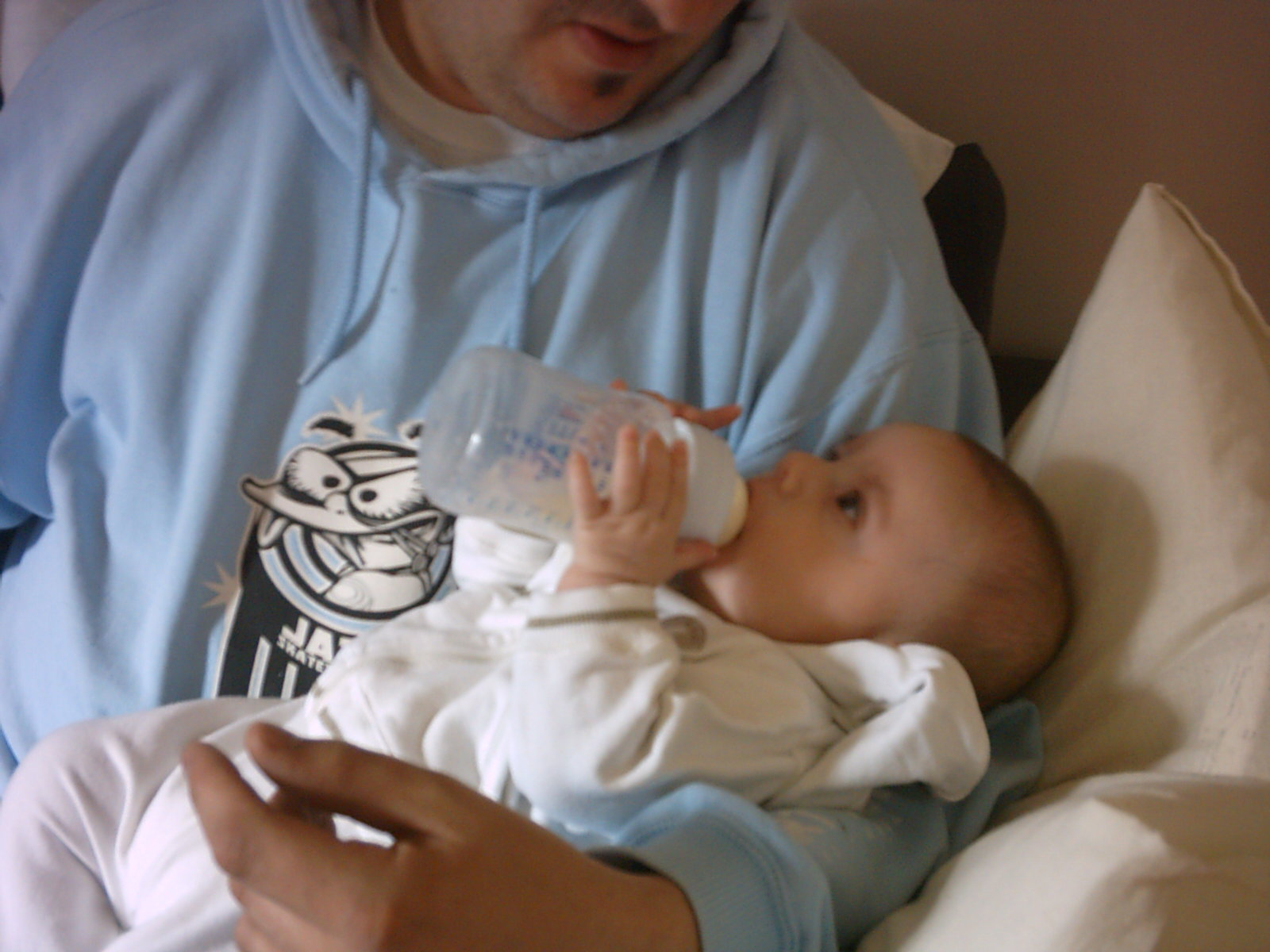 Un père et son fils!